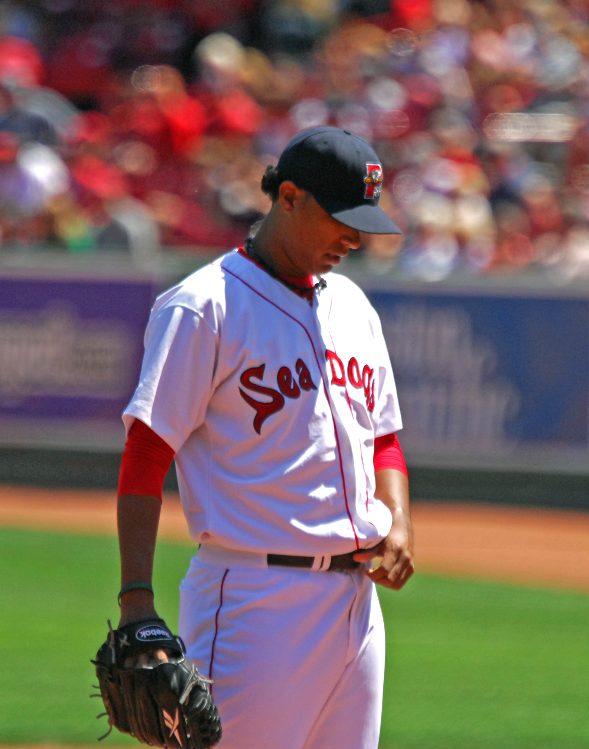 Félix Doubront